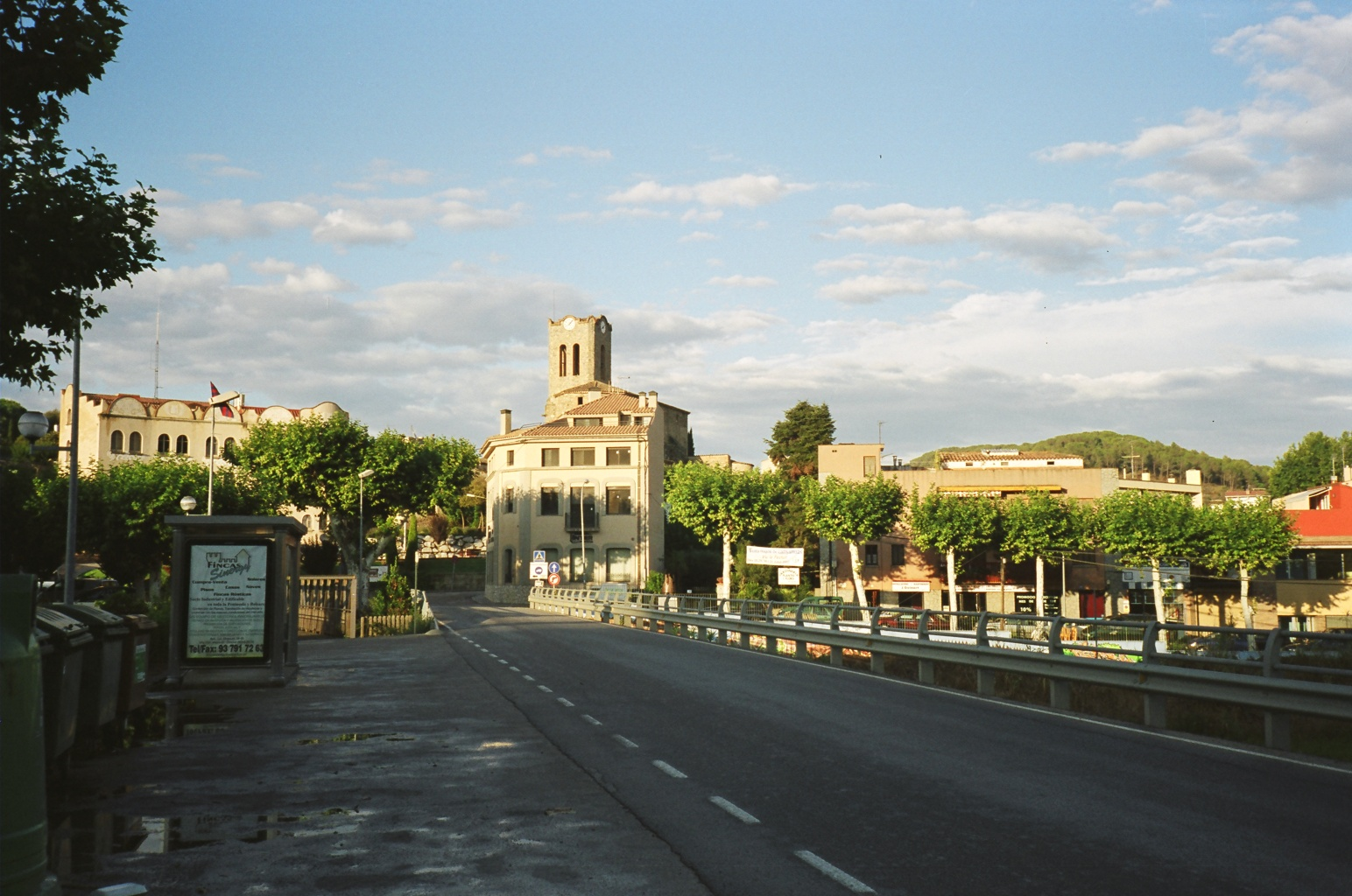 Dosrius,Maresme,Catalunya